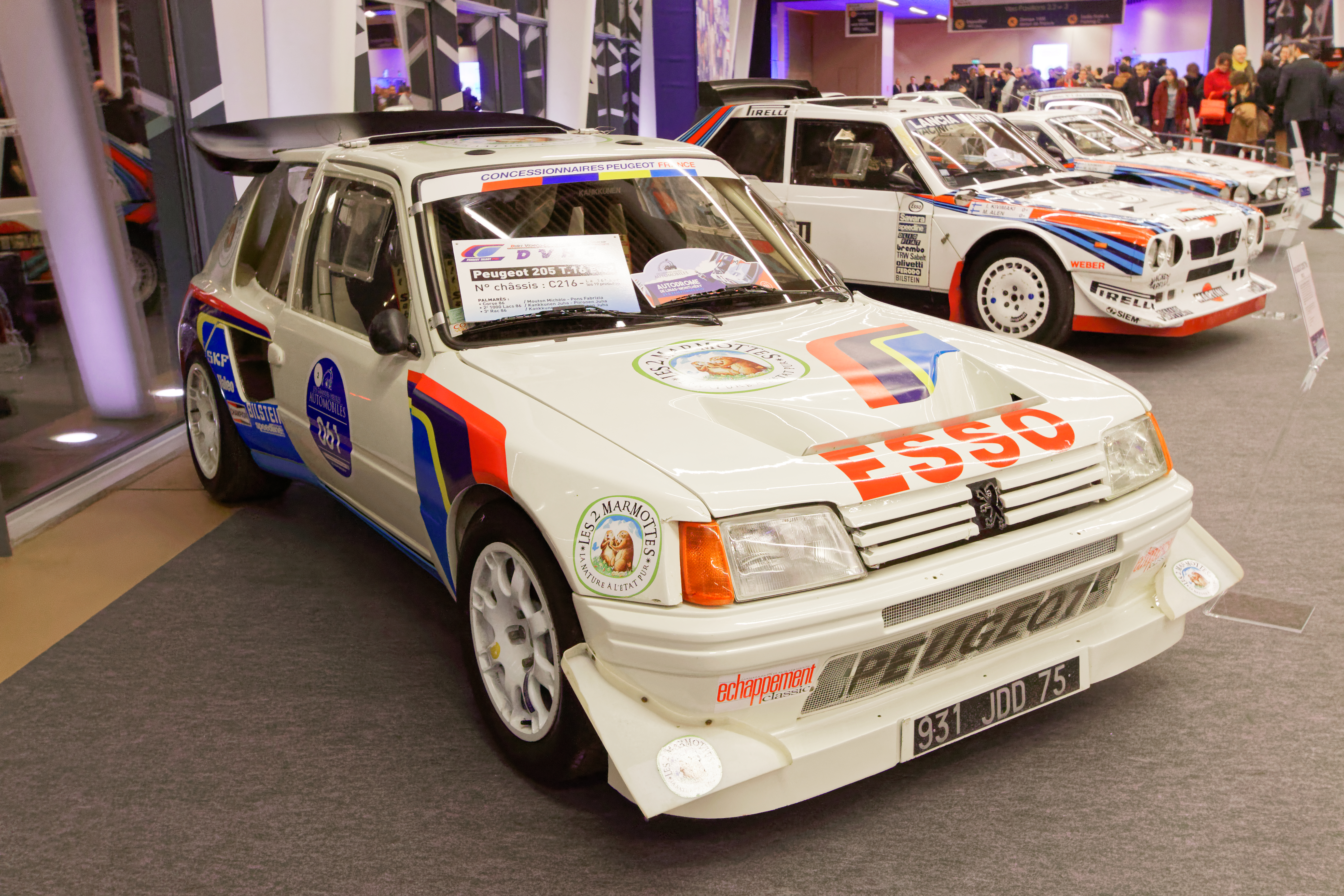 Une Swissauto 500 cm3 de 2001 exposée lors du salon Rétromobile 2017.